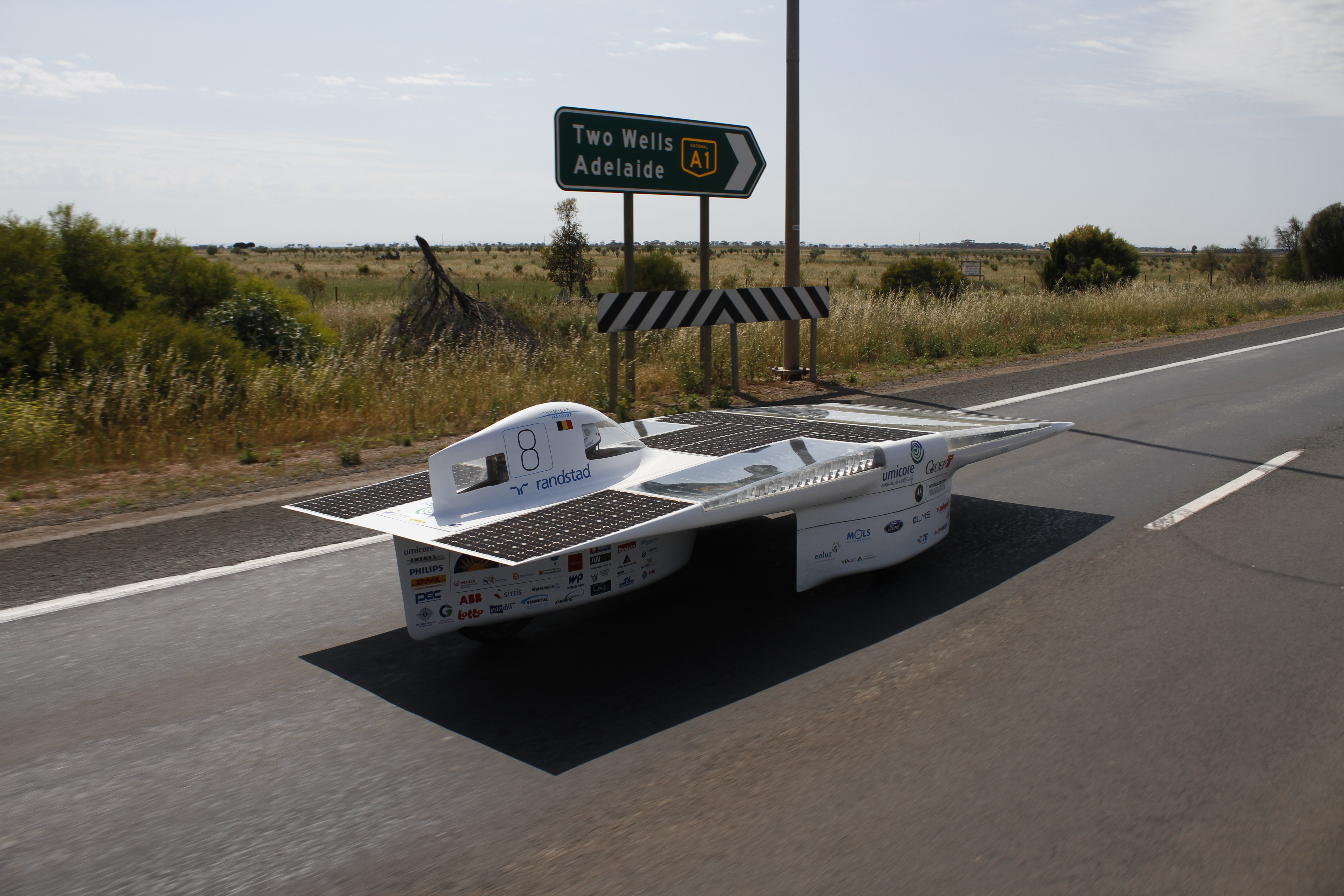 De umicar Imagine tijdens de World Solar Challenge 2011